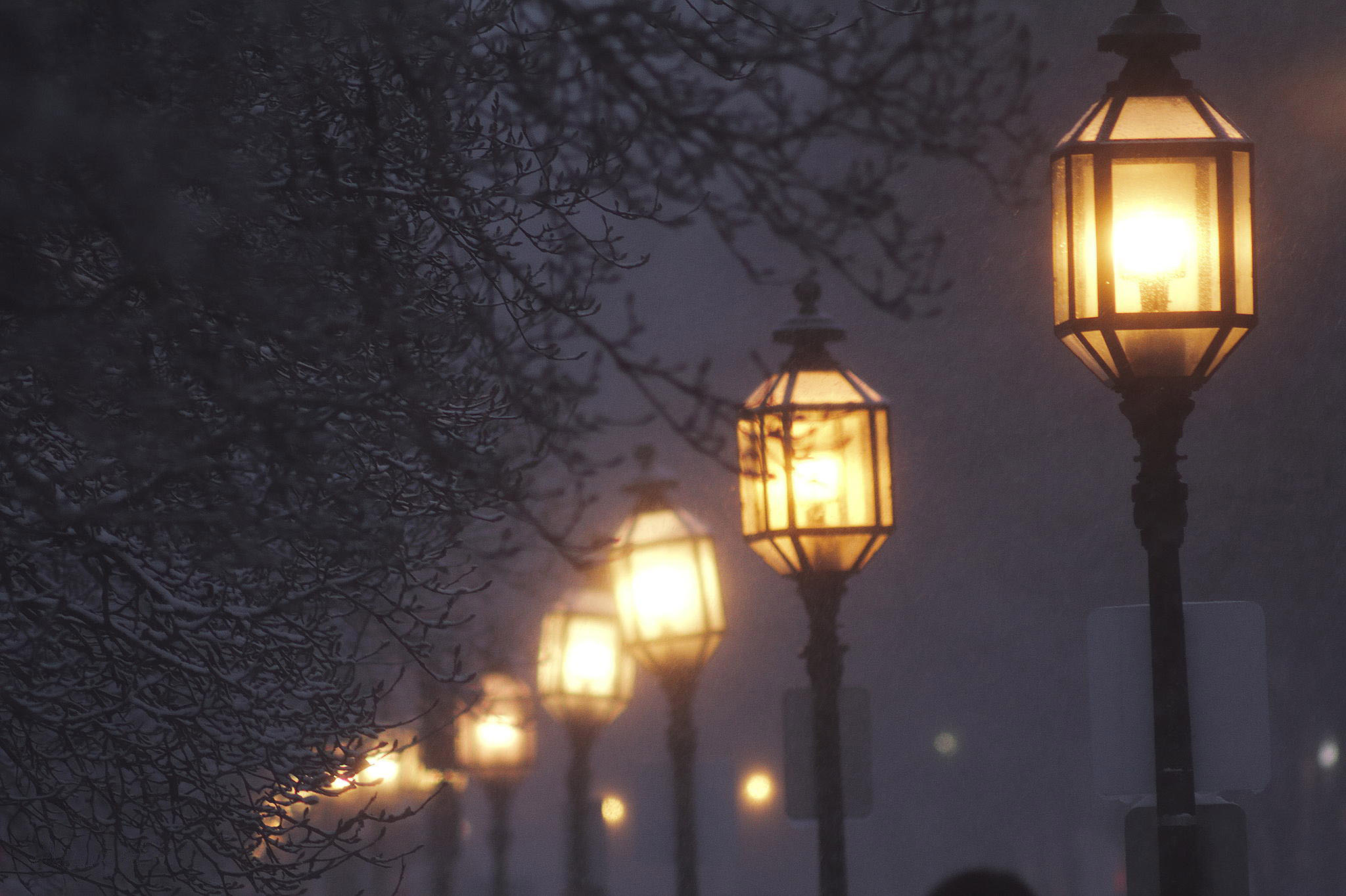 Уличные фонари в Массачусетсе